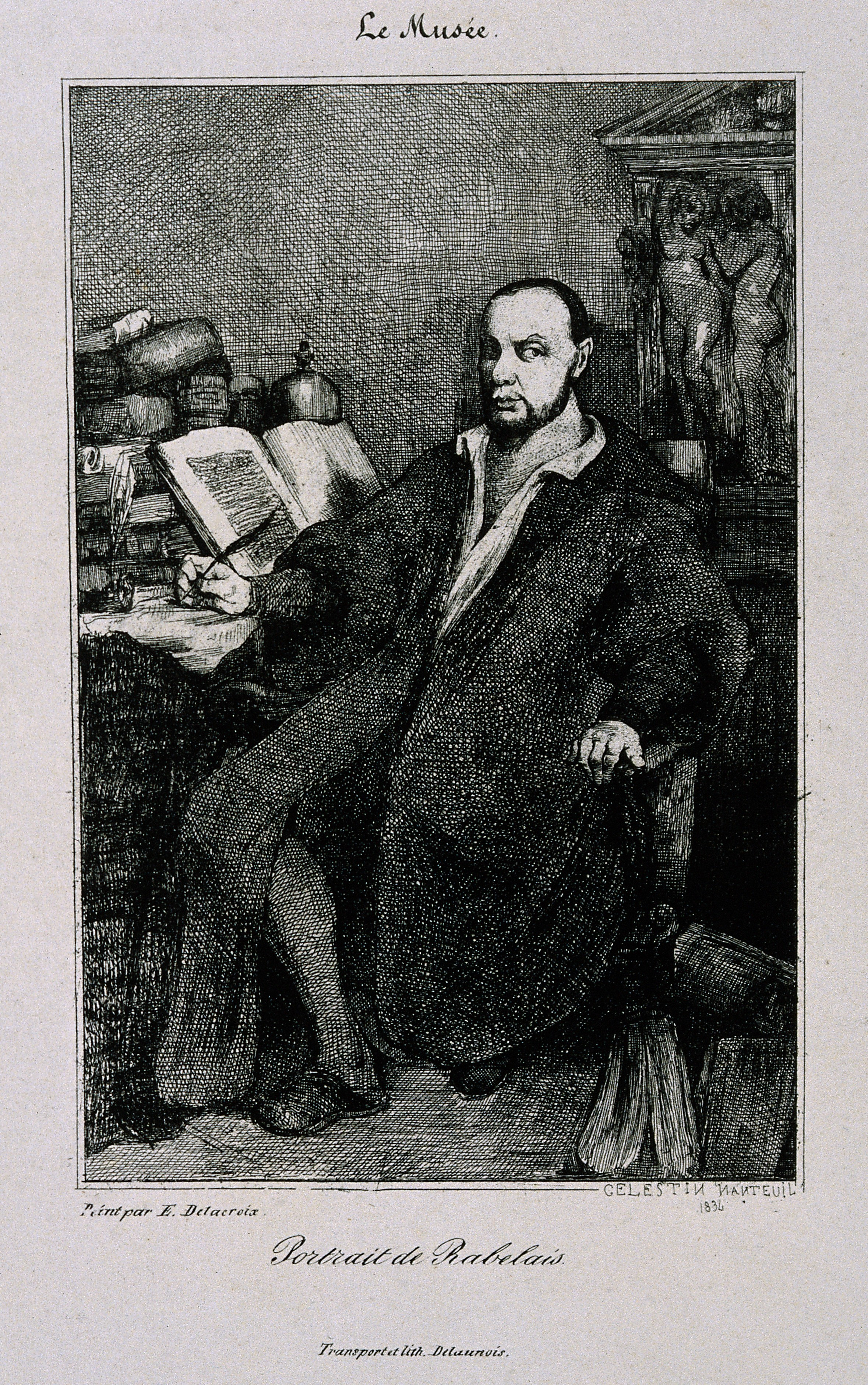 Genre/Technique: Portrait prints. Lithographs. Subject name: Rabelais, François, approximately 1490-1553?